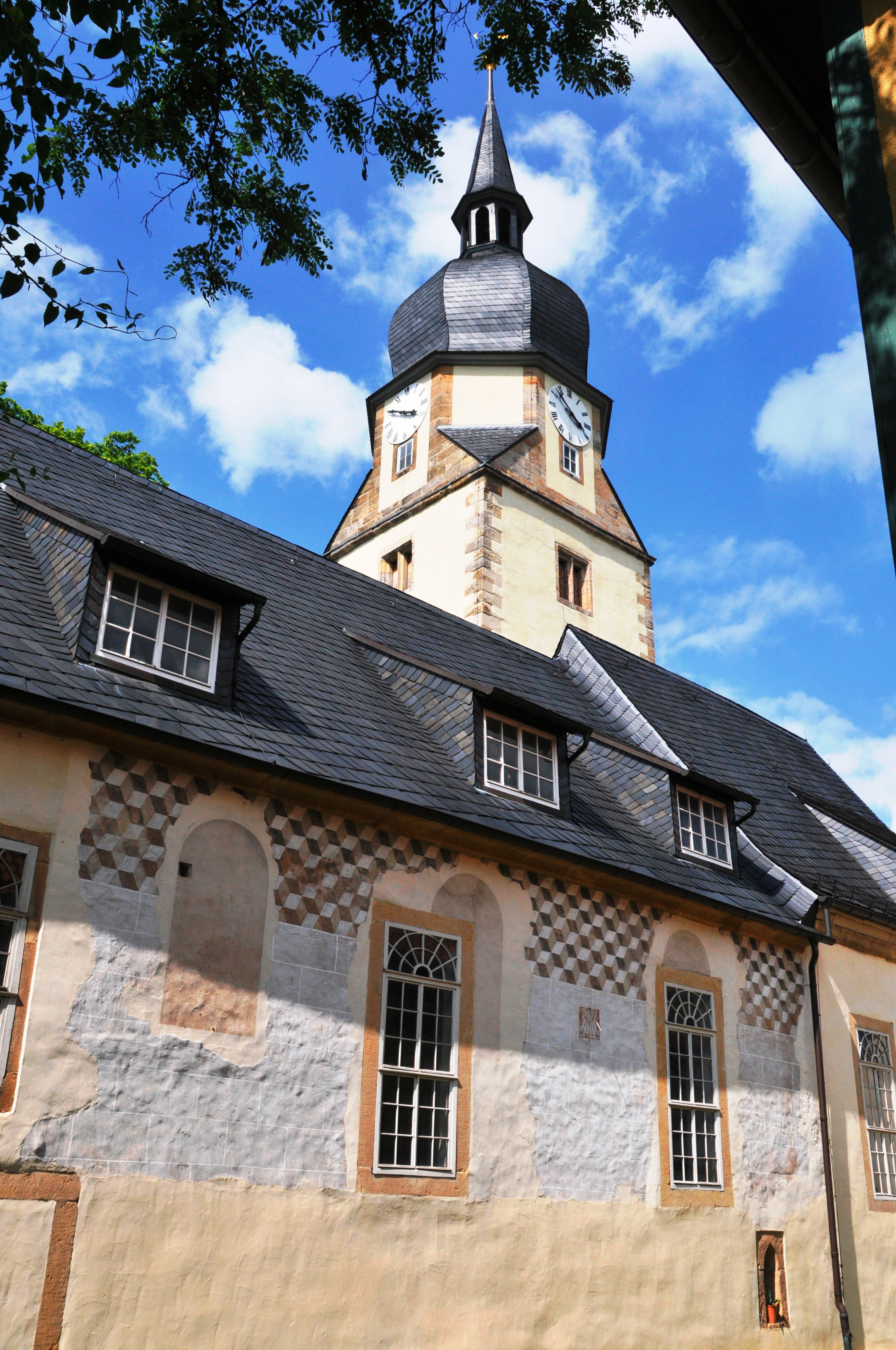 Apfelstädt, Walpurgiskirche